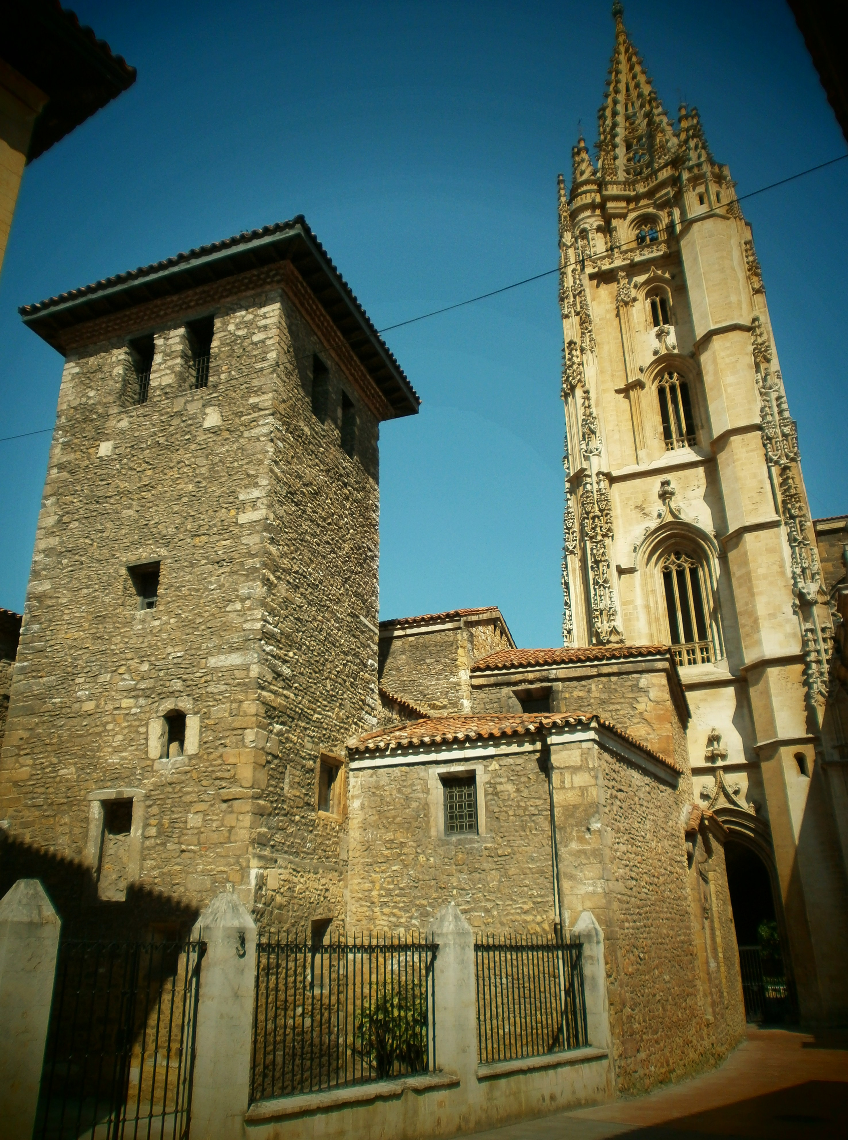 Iglesia de San Tirso Catedral al fondo